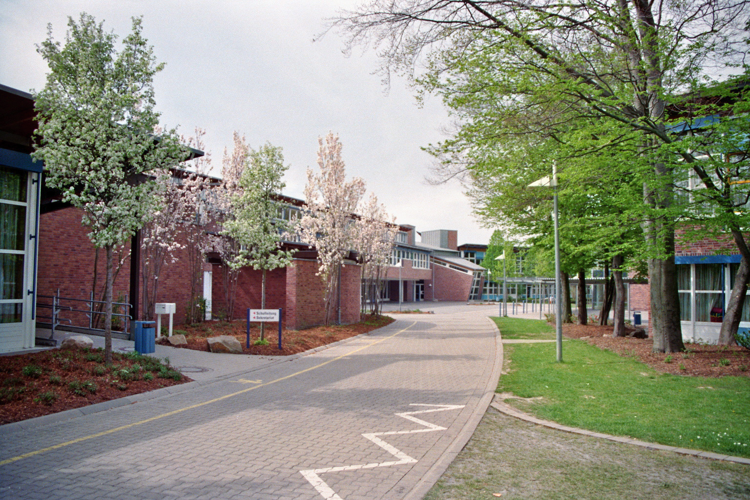 Hedwig-Dransfeld-Schule Werl, Nordrhein-Westfalen, Deutschland.